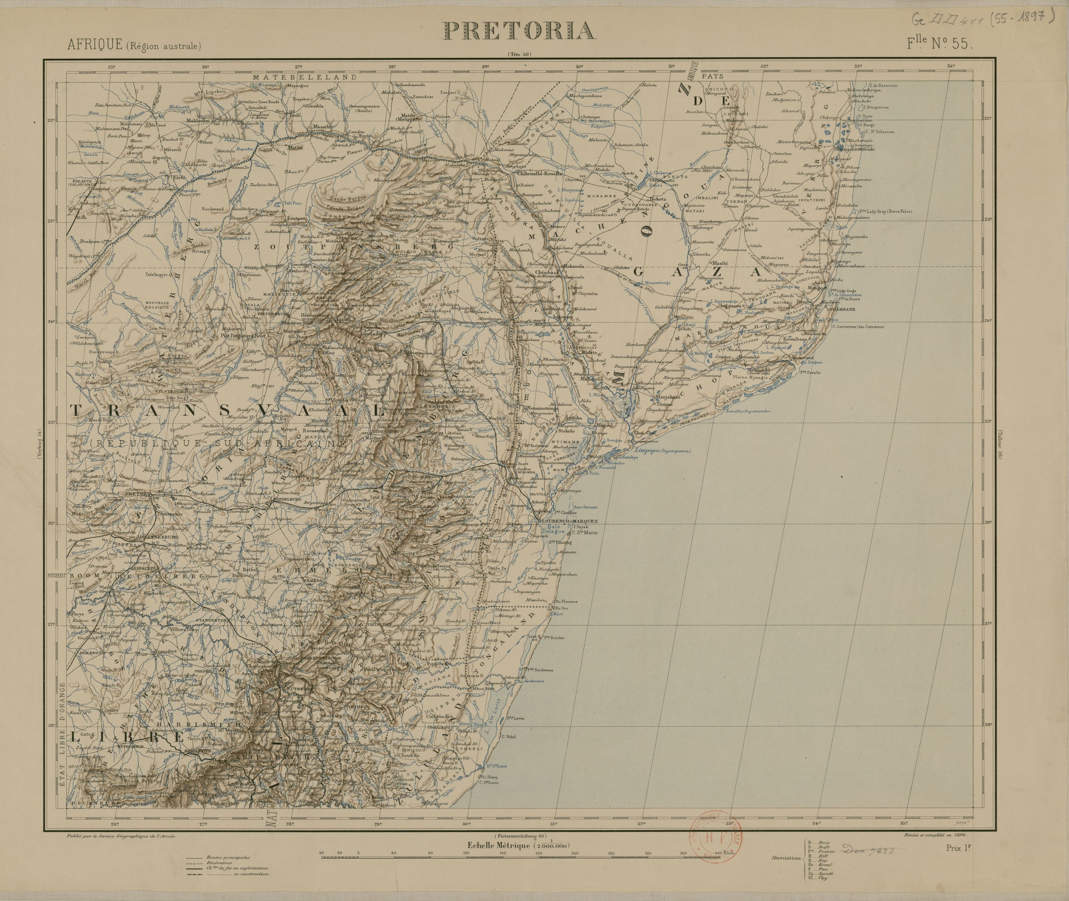 Pretoria, Feuille Nº 55 de la Carte d’Afrique à l’échelle de 1 : 2 000 000 par Richard de Régnauld de Lannoy de Bissy (1874–1889). Révisé et complété en 1896. Conservé à la Bibliothèque nationale française.